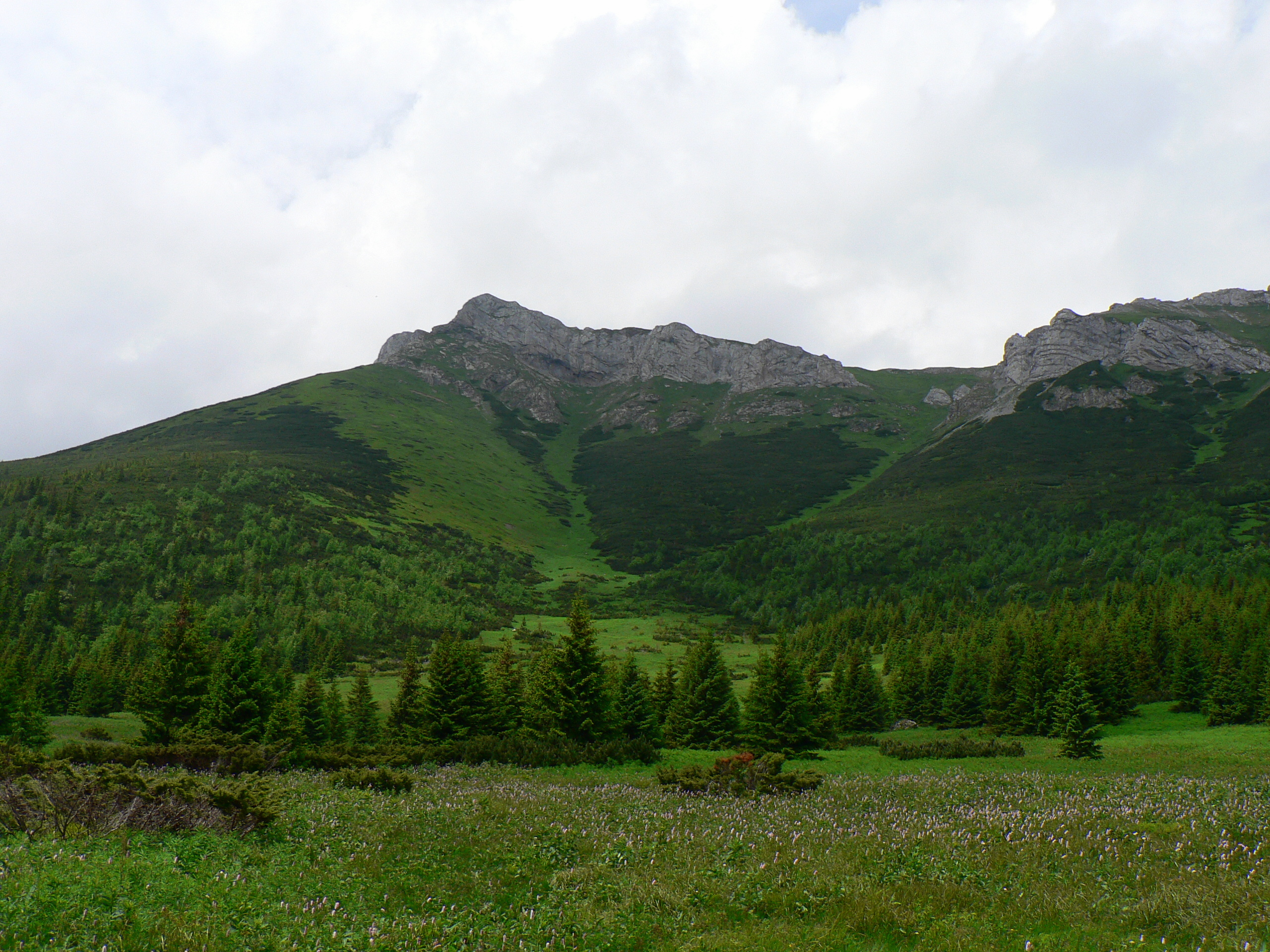 Skrajne Jatki i Bujacza Przełęcz ze Wspólnej Pastwy w Dolinie Kieżmarskiej